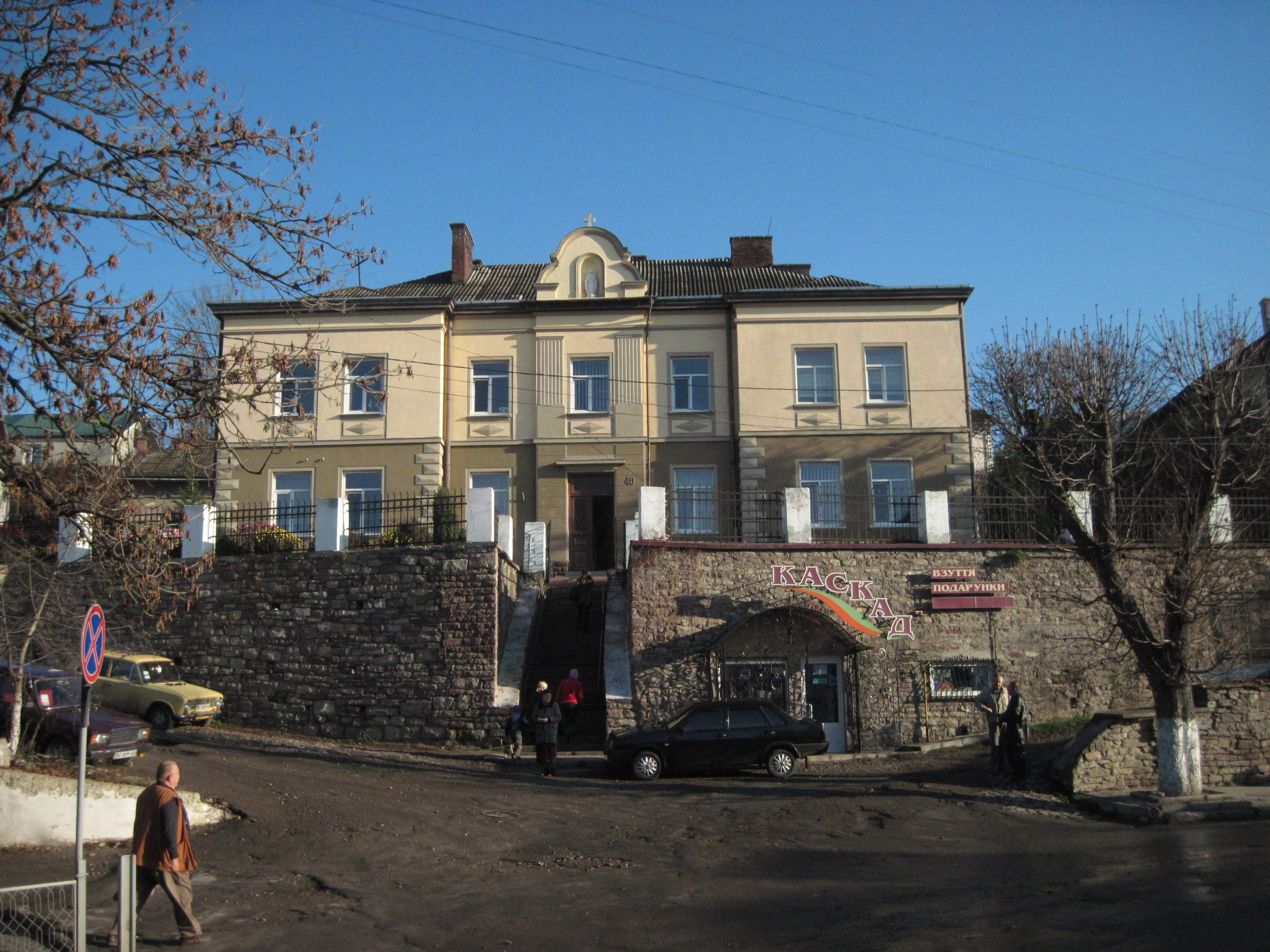 Дитяча захоронка (садок, тепер поліклініка Бучацької центральної районної клінічної лікарні). Бучач, осінь 2013